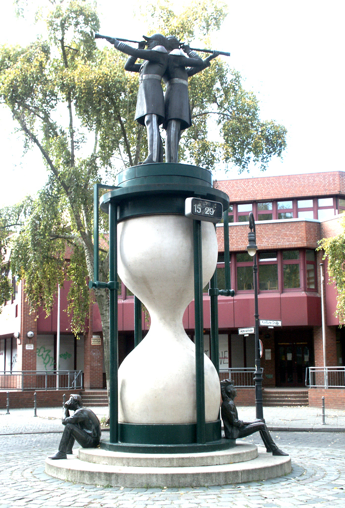 Ludmila-Seefried-Matějková, bronz / kámen / železo